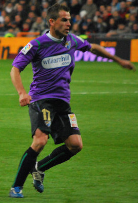 Real Madrid 2 - Malaga 0 24 enero 2010